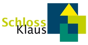 Logo von Schloss Klaus, Österreich